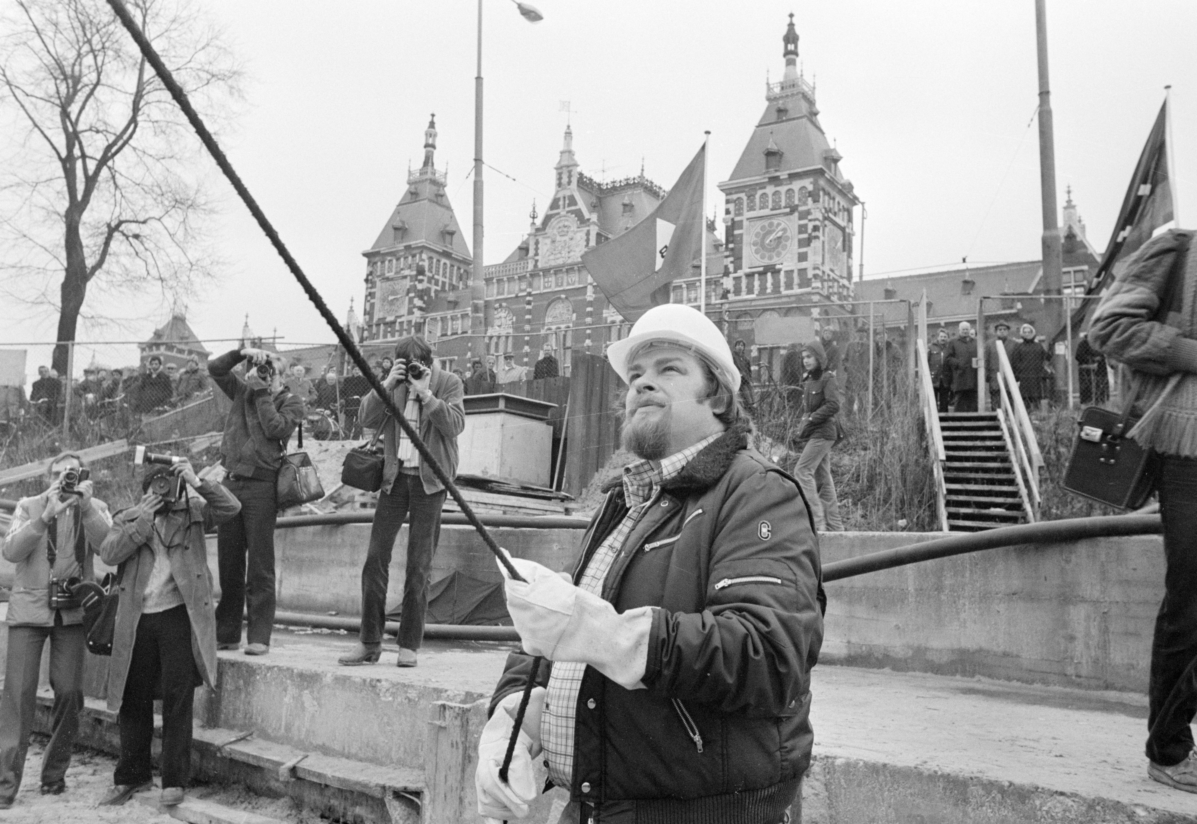 Nationaal Archief Beschrijving: Wethouder Schaefer slaat eerste paal voor Noord Zuid Hollands koffiehuis Datum: 4 februari 1980 Bestanddeelnummer NL-HaNA_Anefo_930-6562 Vervaardiger: Bogaerts, Rob / Anefo URL: Voor meer informatie over het Nationaal Archief: Voor meer foto's uit deze en andere collecties, bezoek onze Beeldbank:, U kunt ons helpen onze kennis van de fotocollecties te verrijken door tags en commentaren toe te voegen. Herkent u mensen of locaties of heeft u een bijzonder verhaal te vertellen bij één van de foto's, laat dan een reactie achter (als u ingelogd bent bij Flickr) of stuur een mailtje naar